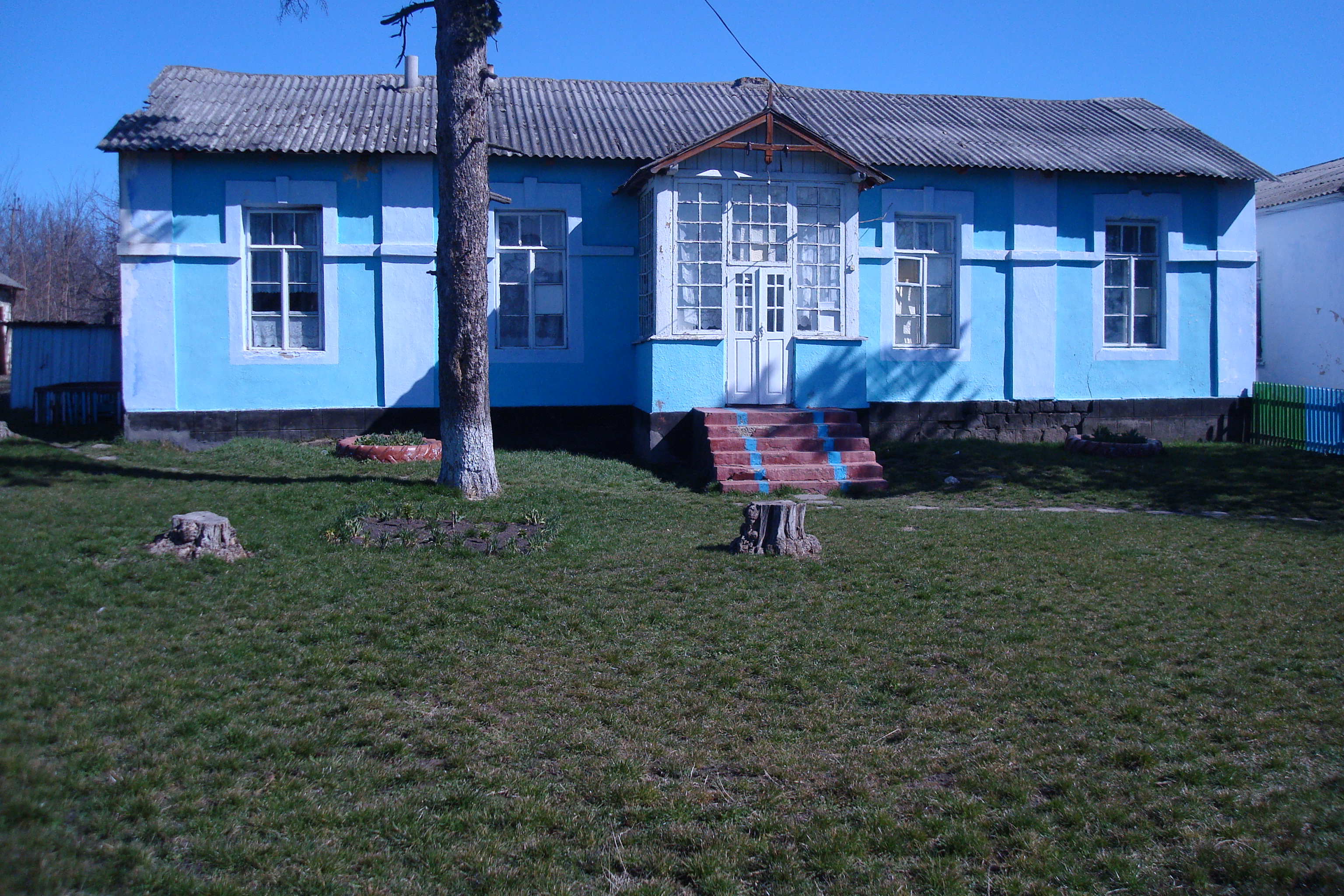 Gradiniţa de copii, Satul Braicău, Donduşeni